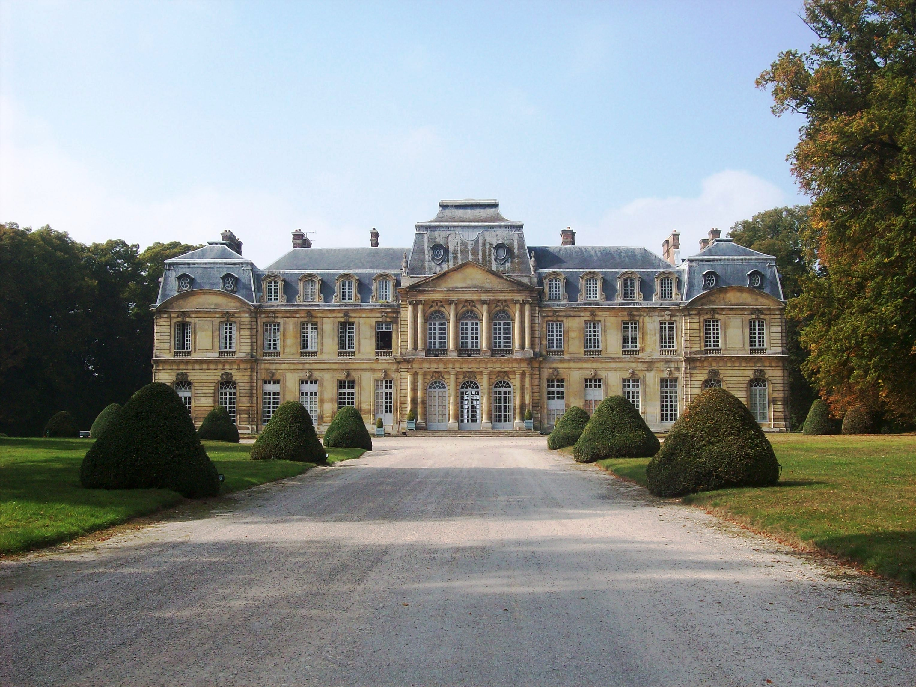 La façade côté cour du château de Champlâtreux en septembre 2009.